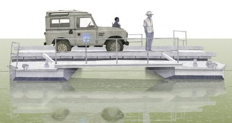 Un valencià al Congo. Imatge d'Andrés Marín que representa l'arribada d'un occidental, potser Mariano Carsí, al Congo.